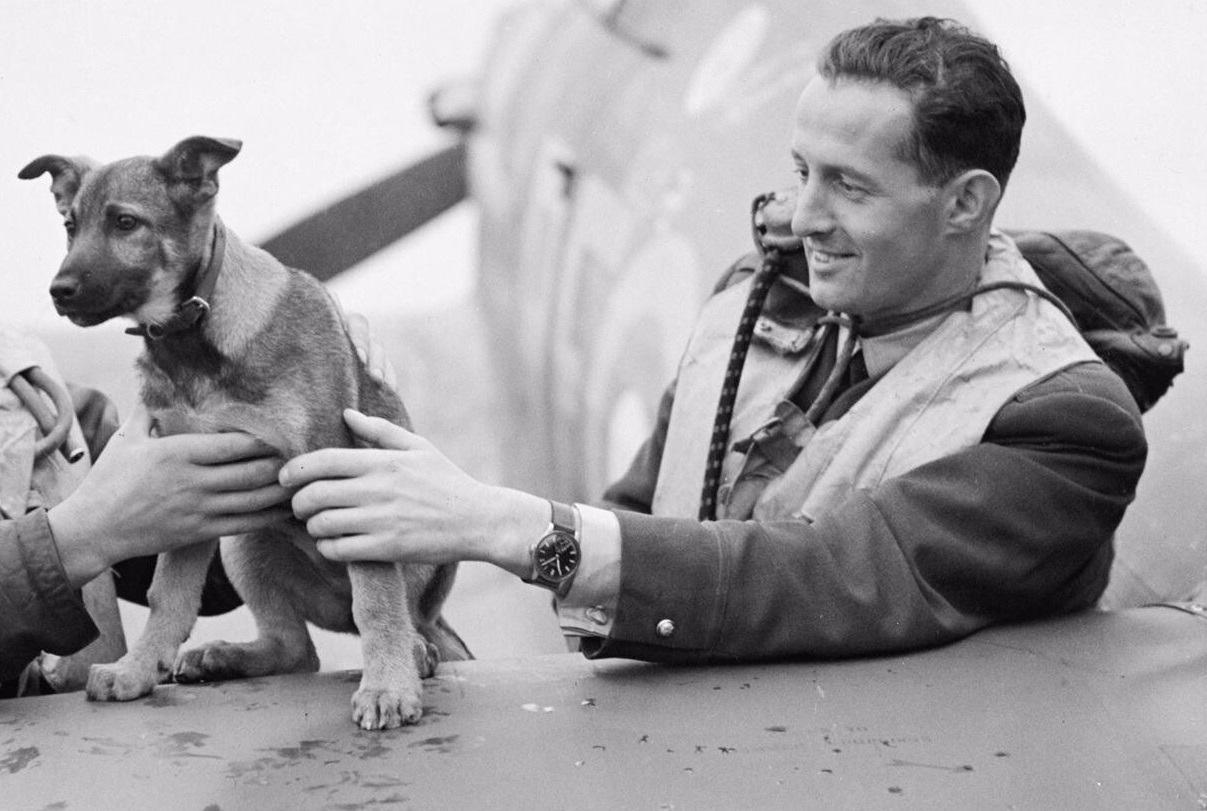 Mirosław Ferić